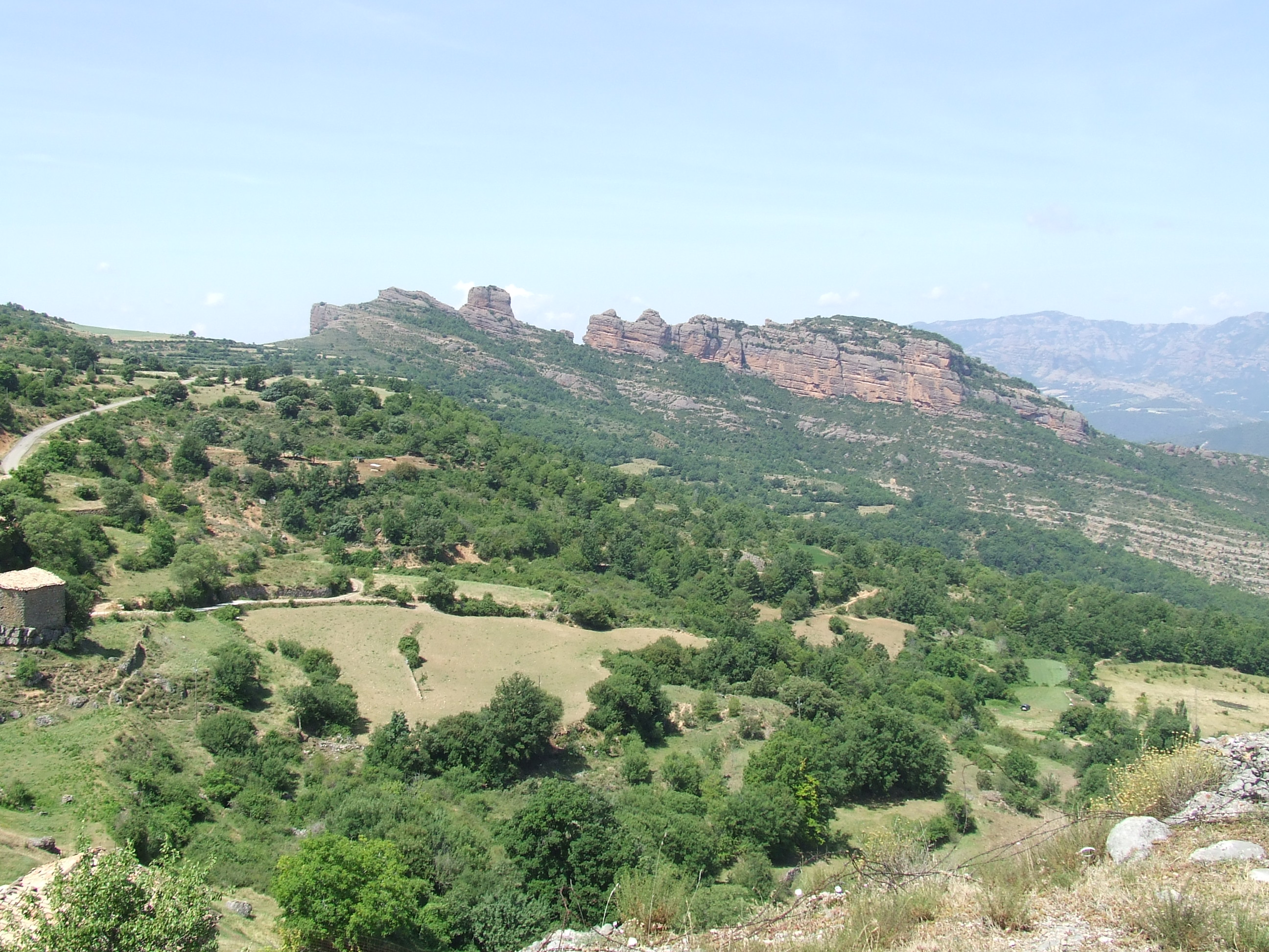 El Tros Pla d'Hortoneda (Conca de Dalt, Pallars Jussà)